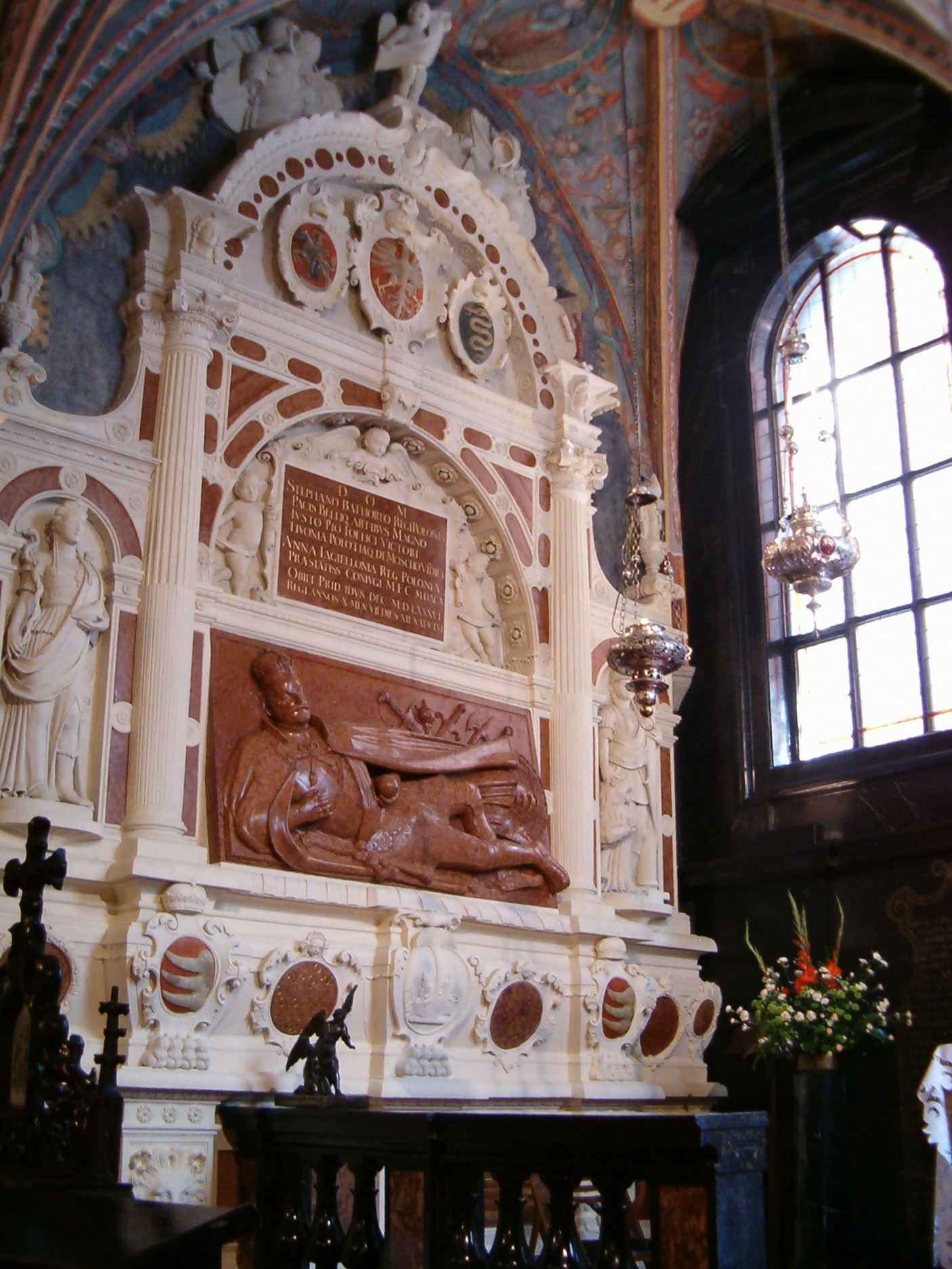 Nagrobek Stefana Batorego w Królewskiej Katedrze na Wawelu